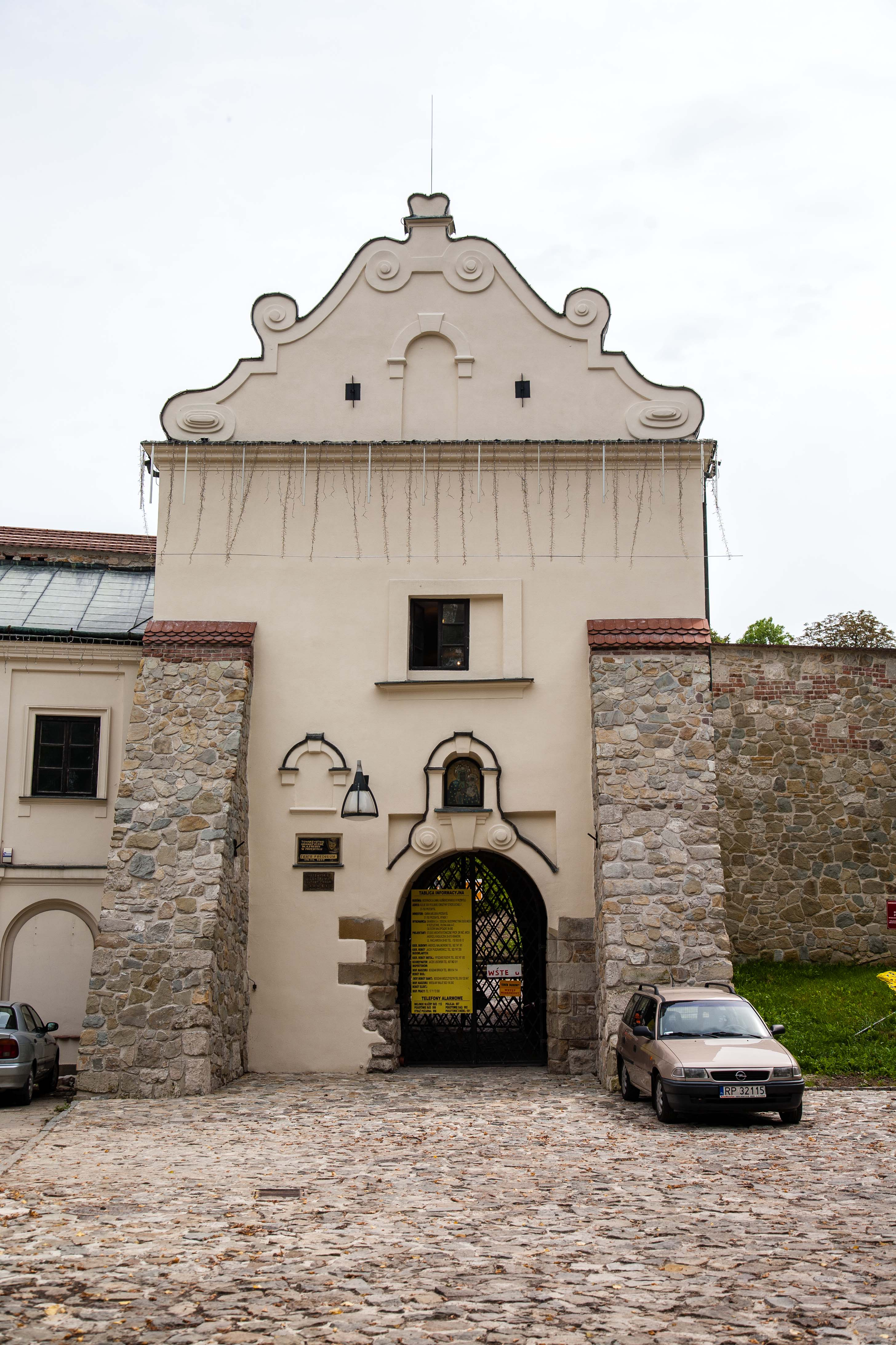 zespół zamkowy Skrzydło północne zamku, mur., XIV, XVIII, XX Budynek bramny Mury z basztami, mur. Fundamenty rotundy i palatium, mur., X-XI Park Przemyśl, Przemyśl 05.1960.